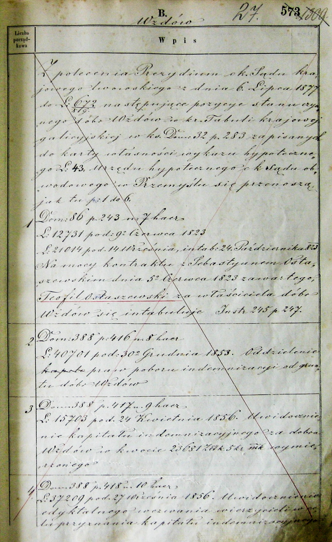 Karta z księgi tabularnej dóbr Wzdów w Sądzie Rejonowym w Brzozowie